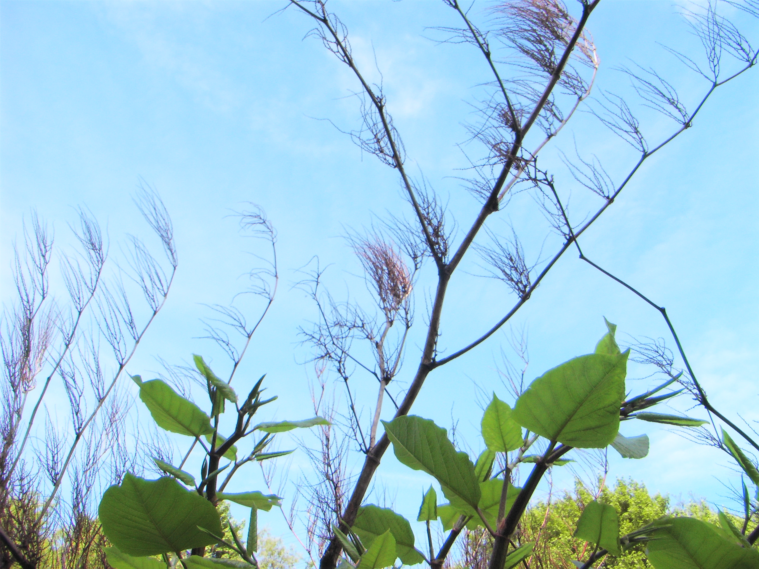 Velocicaptor